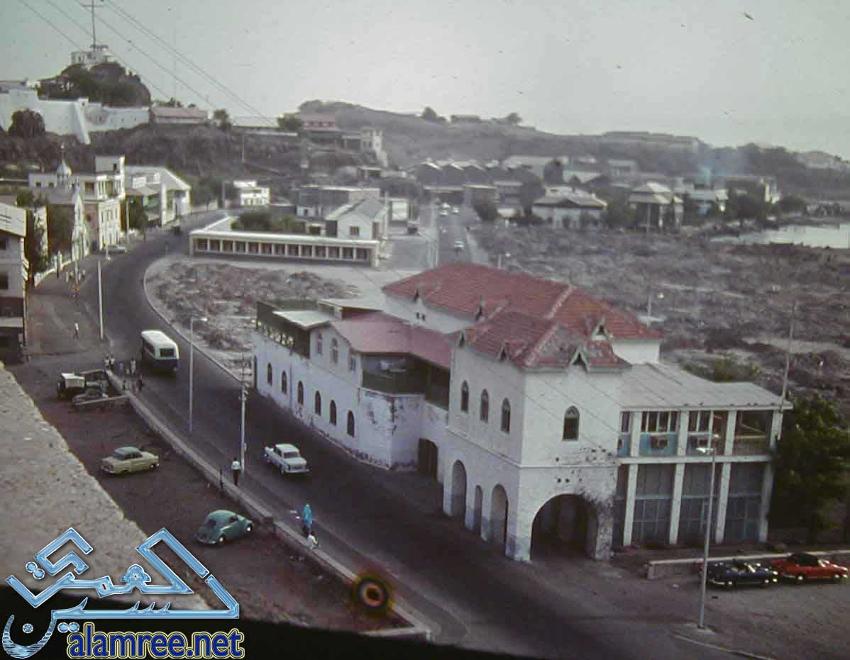 صورة لاجزاء من البنجسار من مبنى التلفزيون 1963